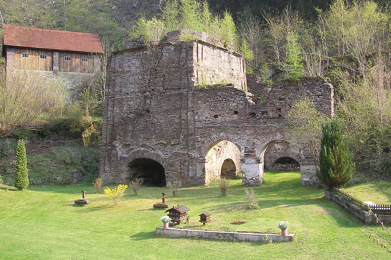 Historische Hochofenanlage in Lölling bei Hüttenberg in Kärnten aus dem 19. Jahrhundert